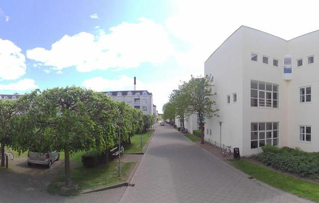 Den centrale gade i bebyggelsen Dalgas Have på Frederiksberg